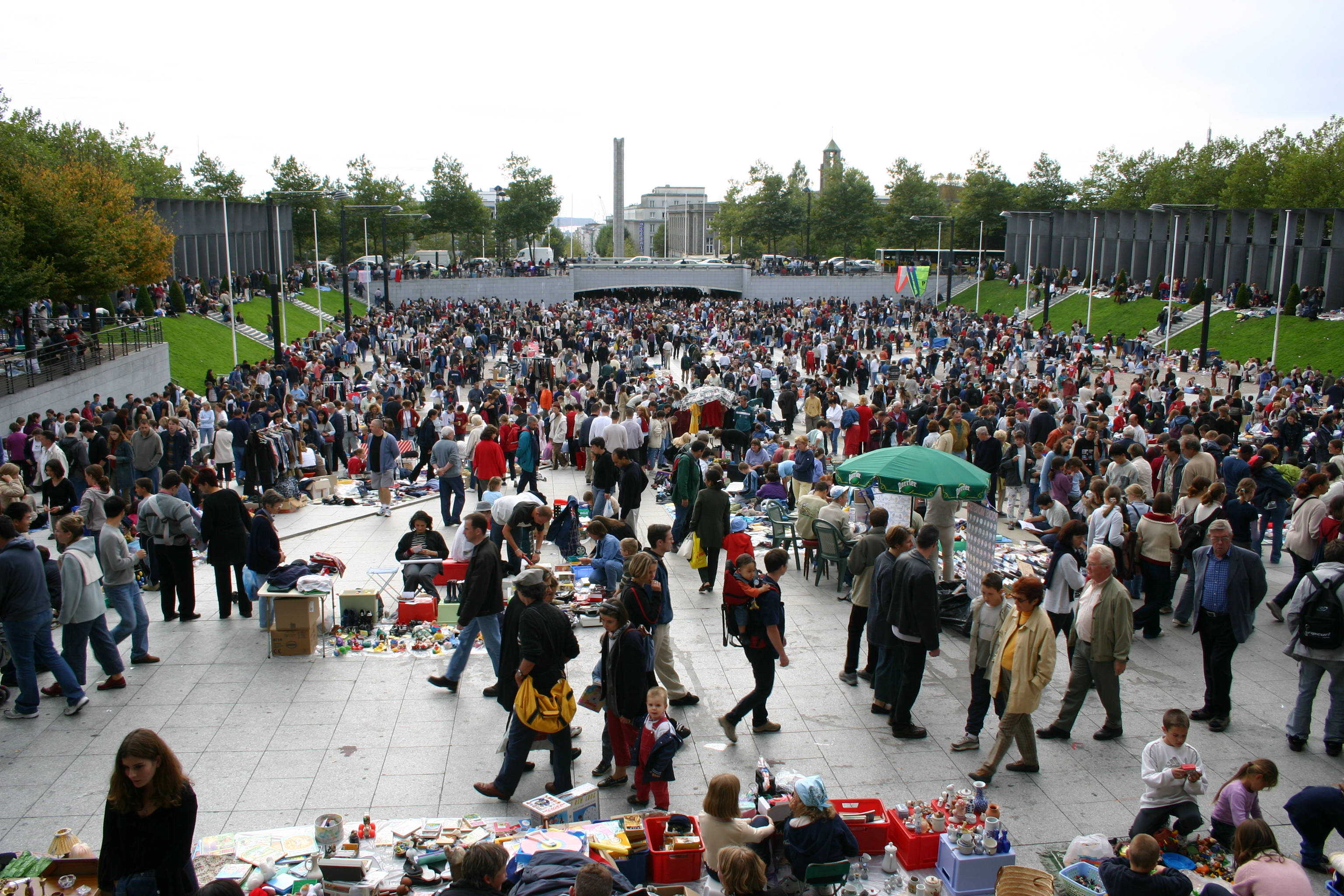 Náměstí Svobody v Brestu, Francie